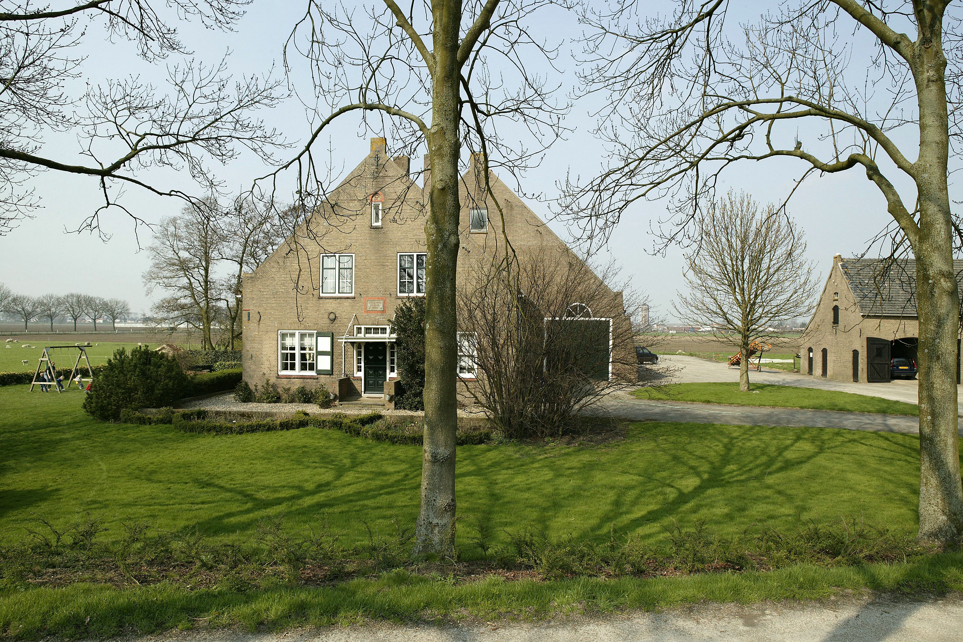 Overzicht boerderij (opmerking: Foto's verkregen uit privé-collectie van fotograaf P. van Galen.)